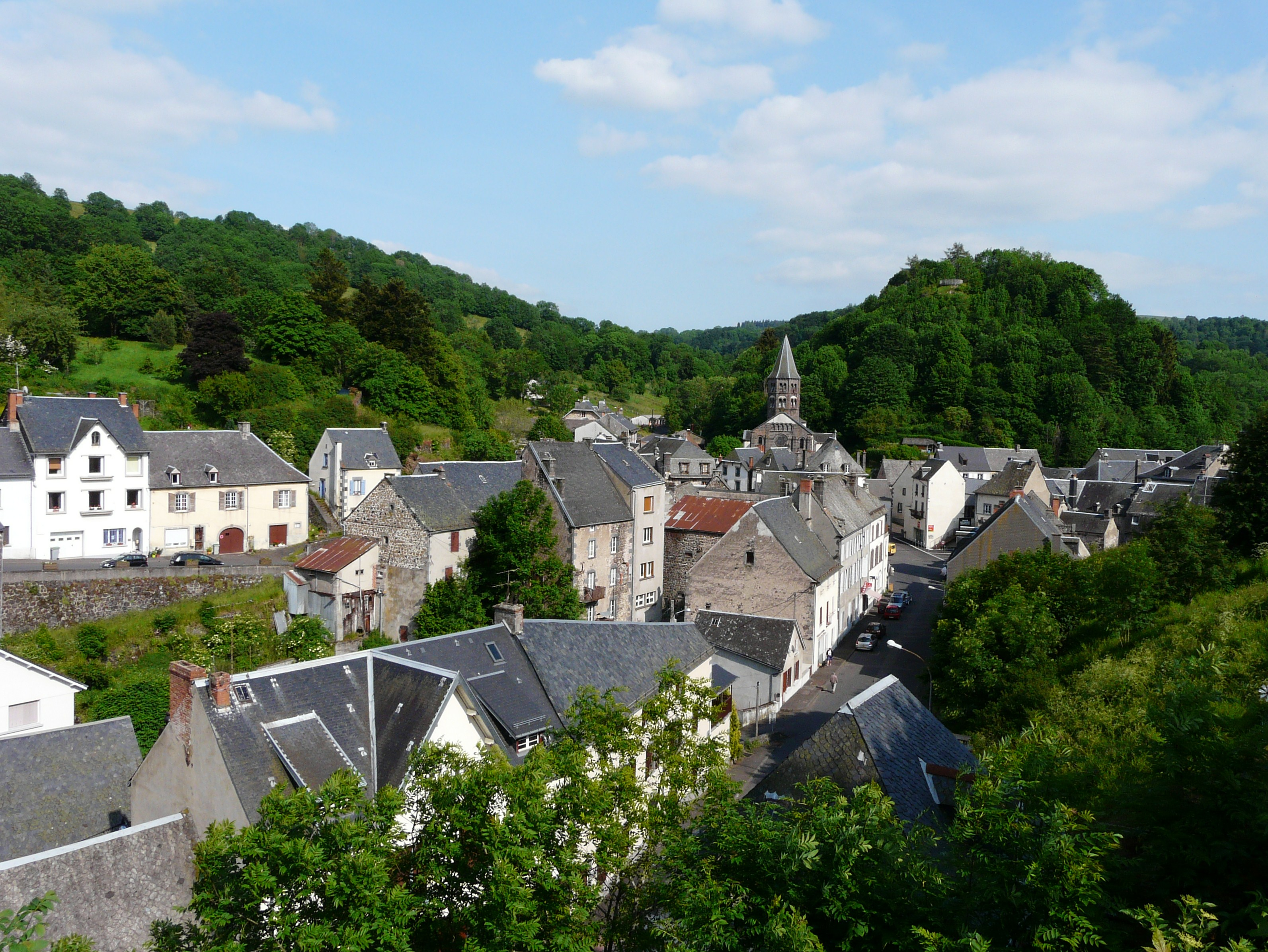 Le village de Rochefort-Montagne, Dordogne, FRance.